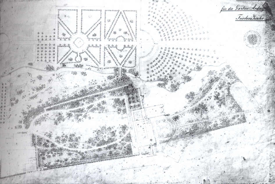 plan of garden at Friedenskirche, park Sanssouci, Potsdam